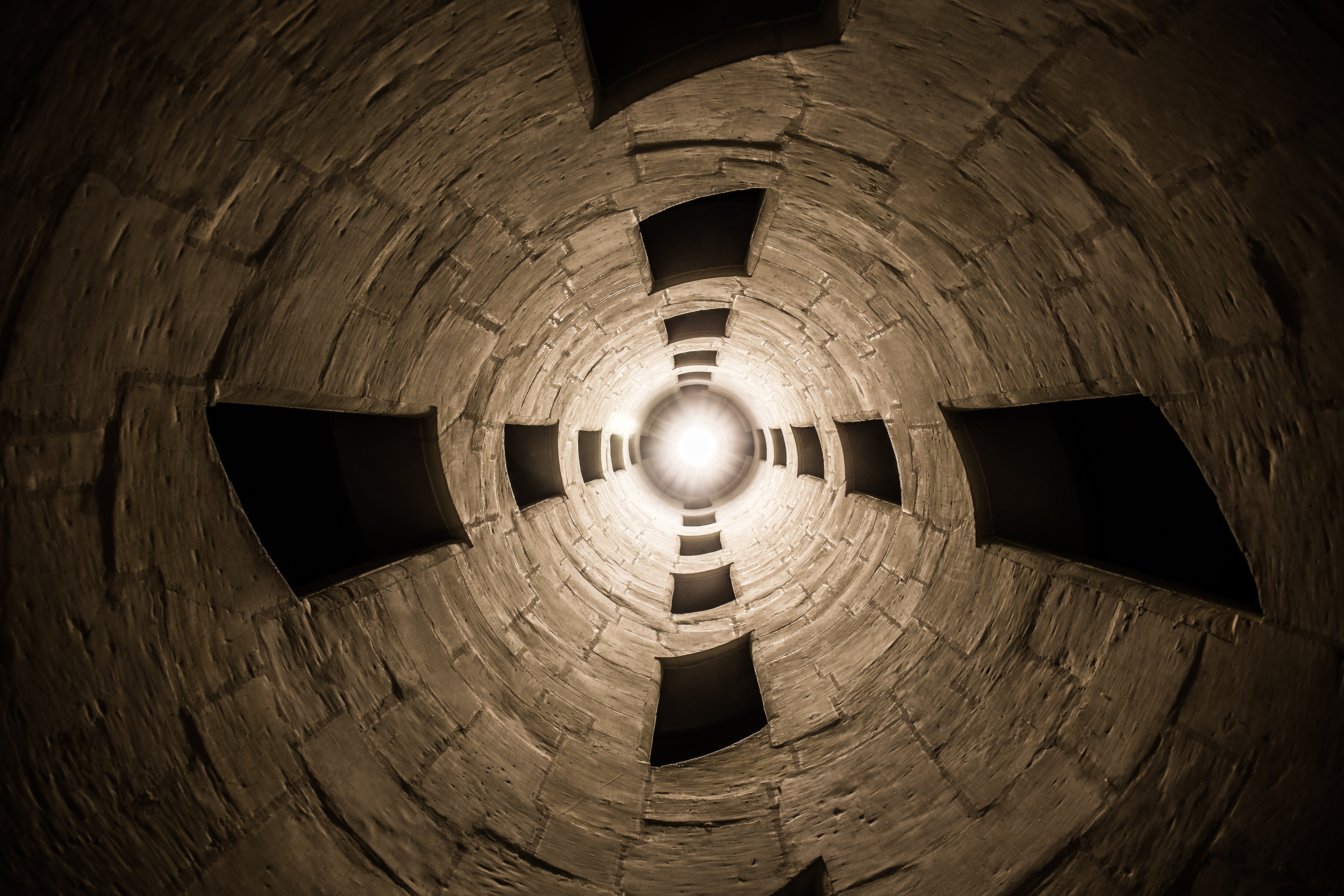 Escalier central du château de Chambord (contreplongée)